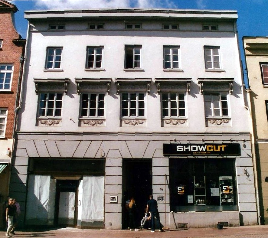 Einstiges Haus der Sonnenapotheke, Mühlenstraße 16, Lübeck